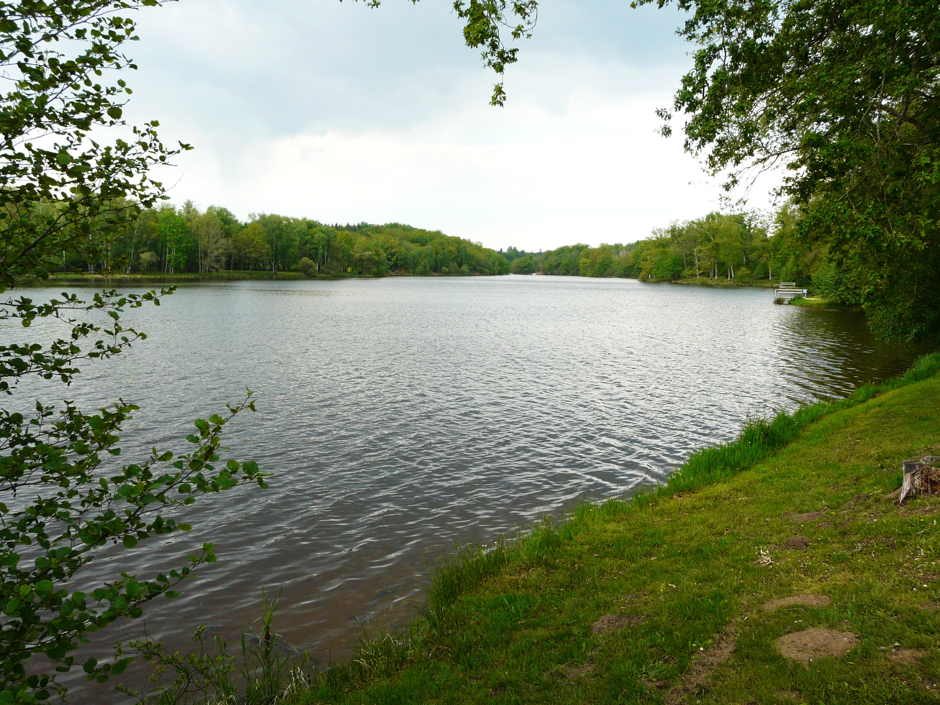 L'étang de Saint-Estèphe vu en direction du nord, Dordogne, France.